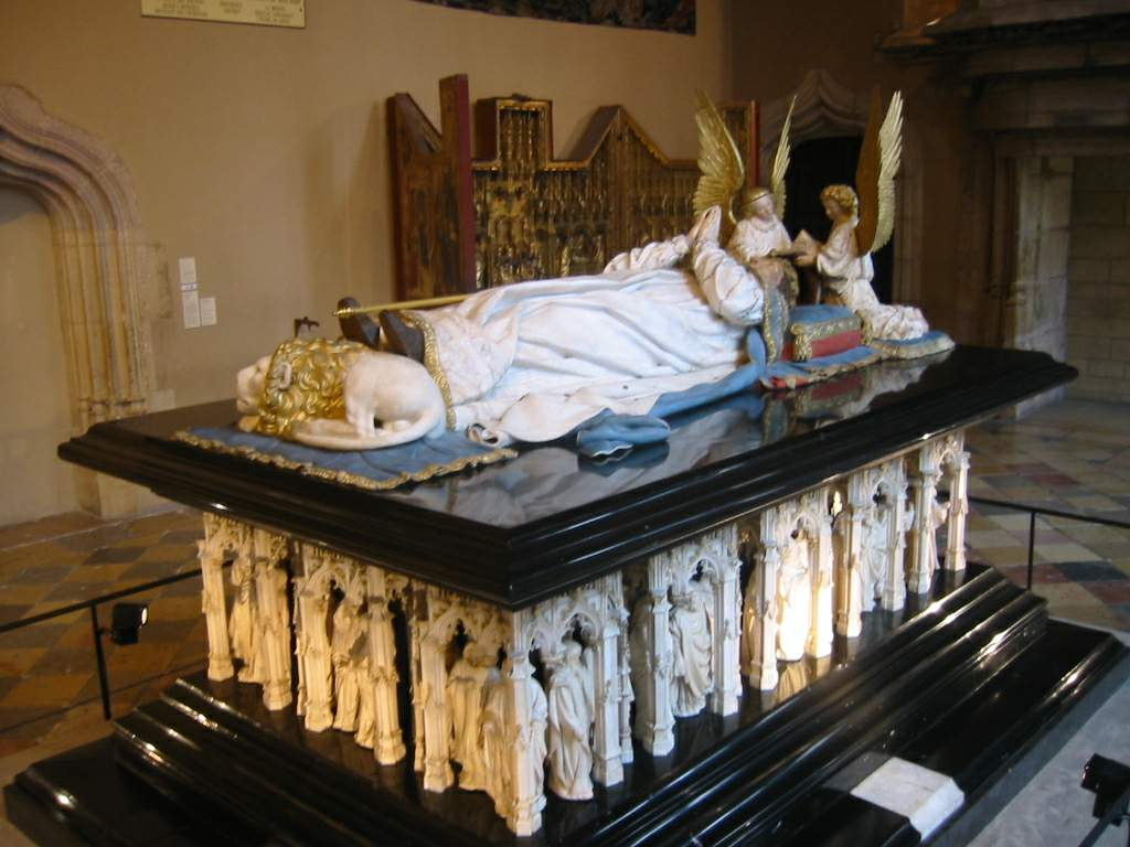 Tombeau du Duc Phillipe le Hardi au Palais des Ducs de Bourgogne à Dijon